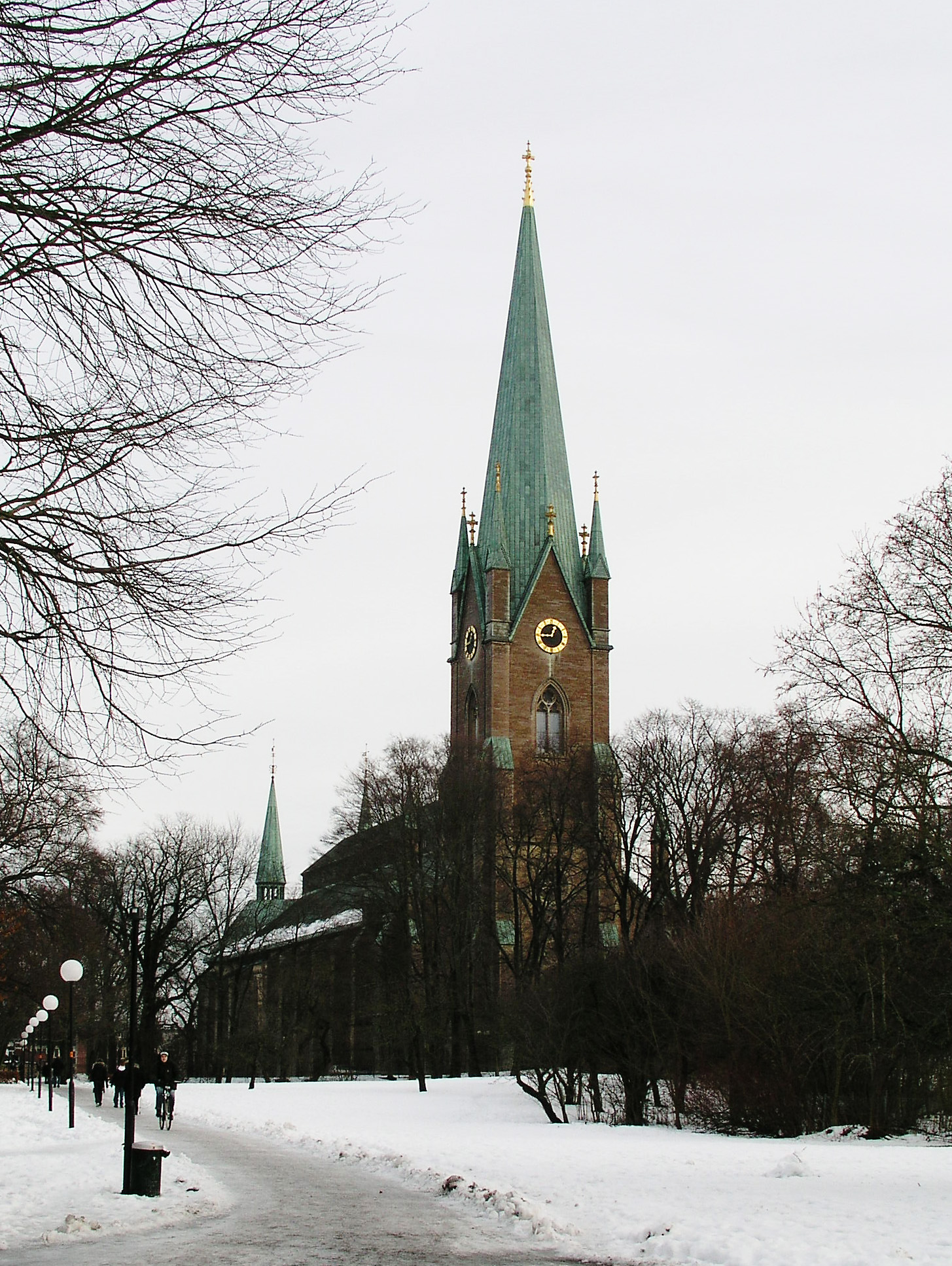 Linköpings domkyrka, Linköping.